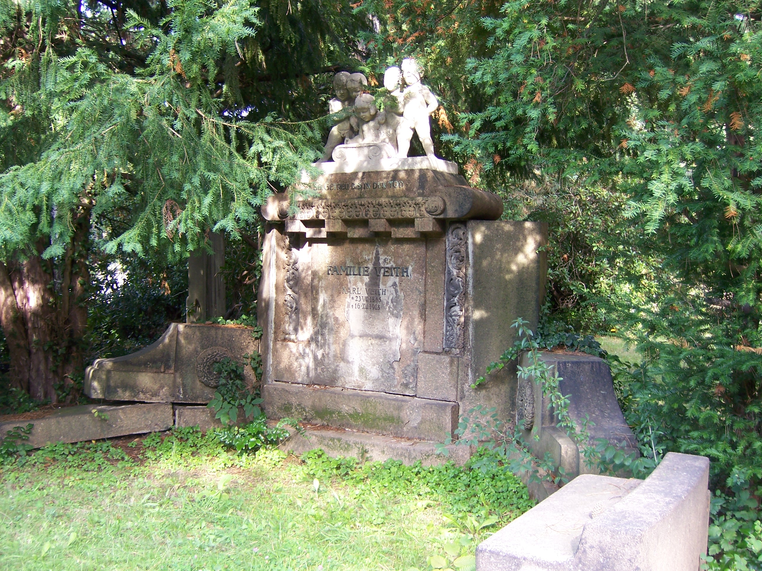 Reinhold Carl: Grabstätte Veith